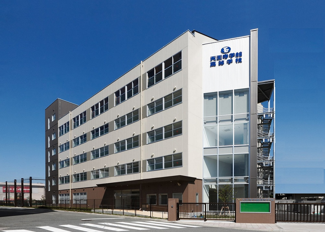 天王寺学館高等学校校舎外観